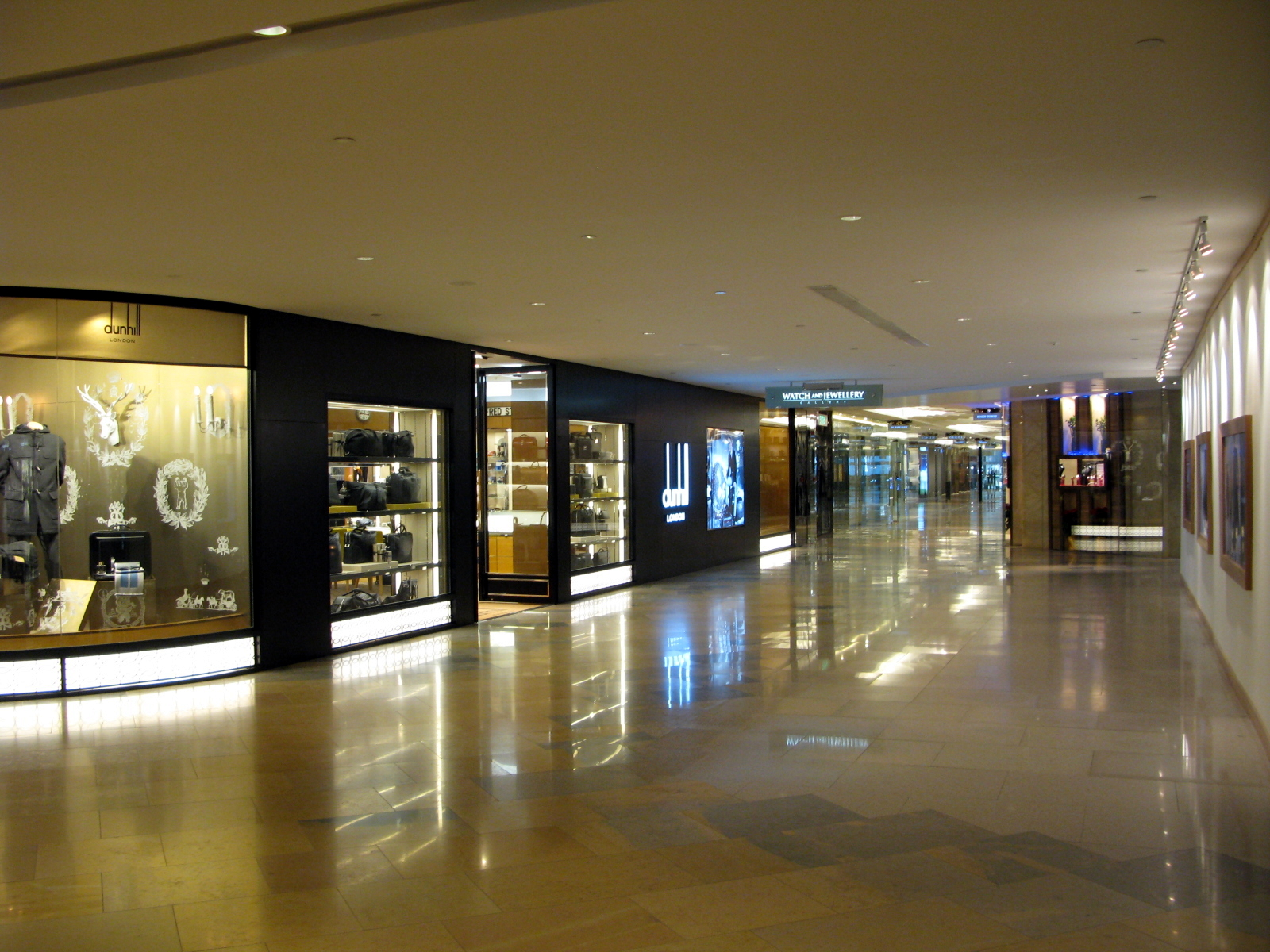 Pacific Place 太古廣場